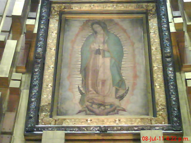 Conjunto Villa de Guadalupe